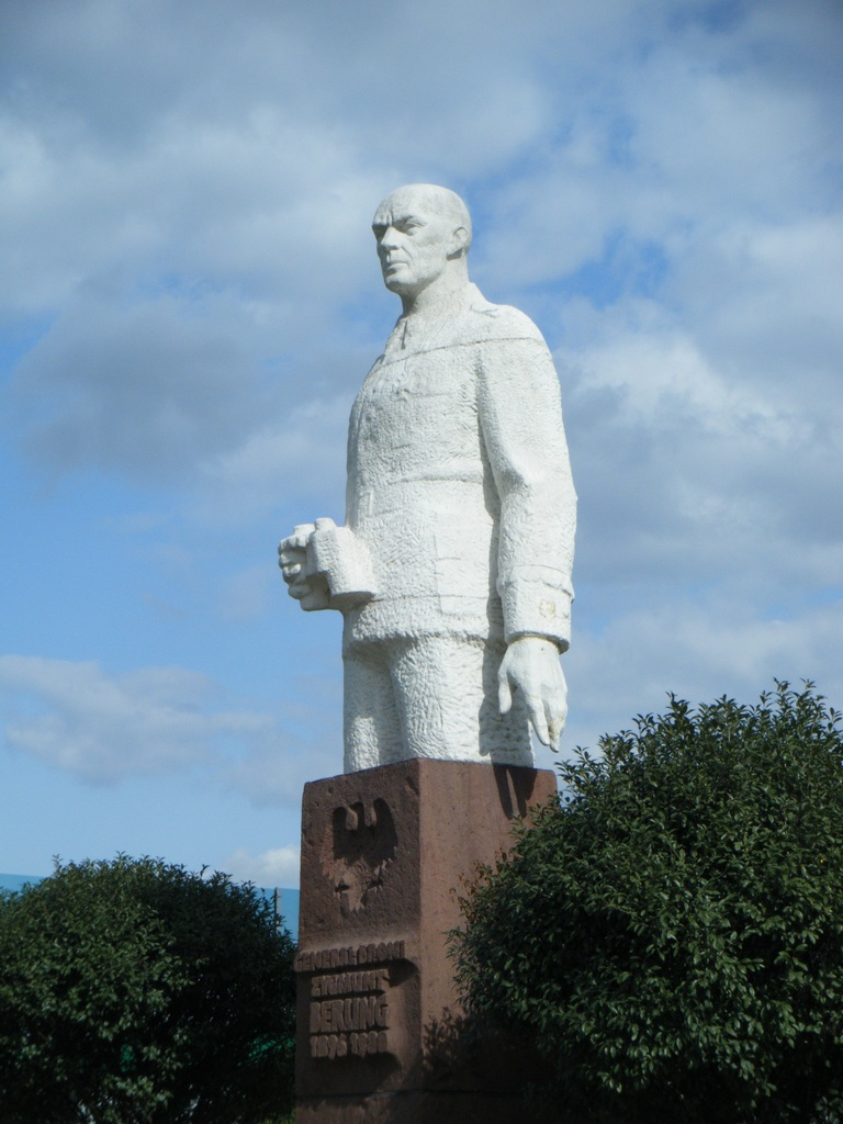 Pomnik gen. Zygmunta Berlinga w Warszawie.